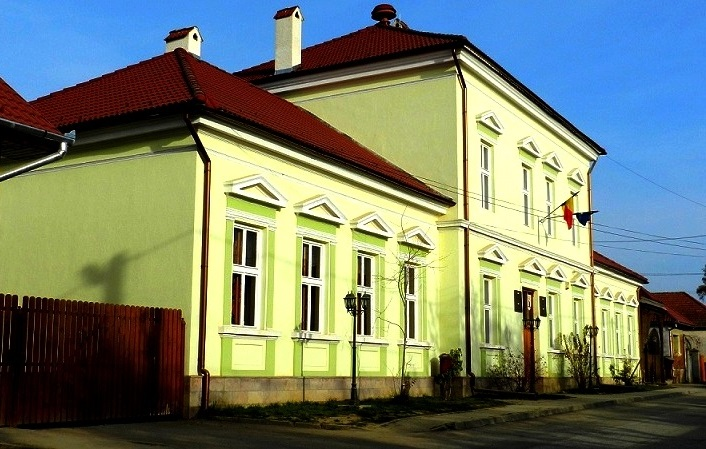 Bardoci községháza